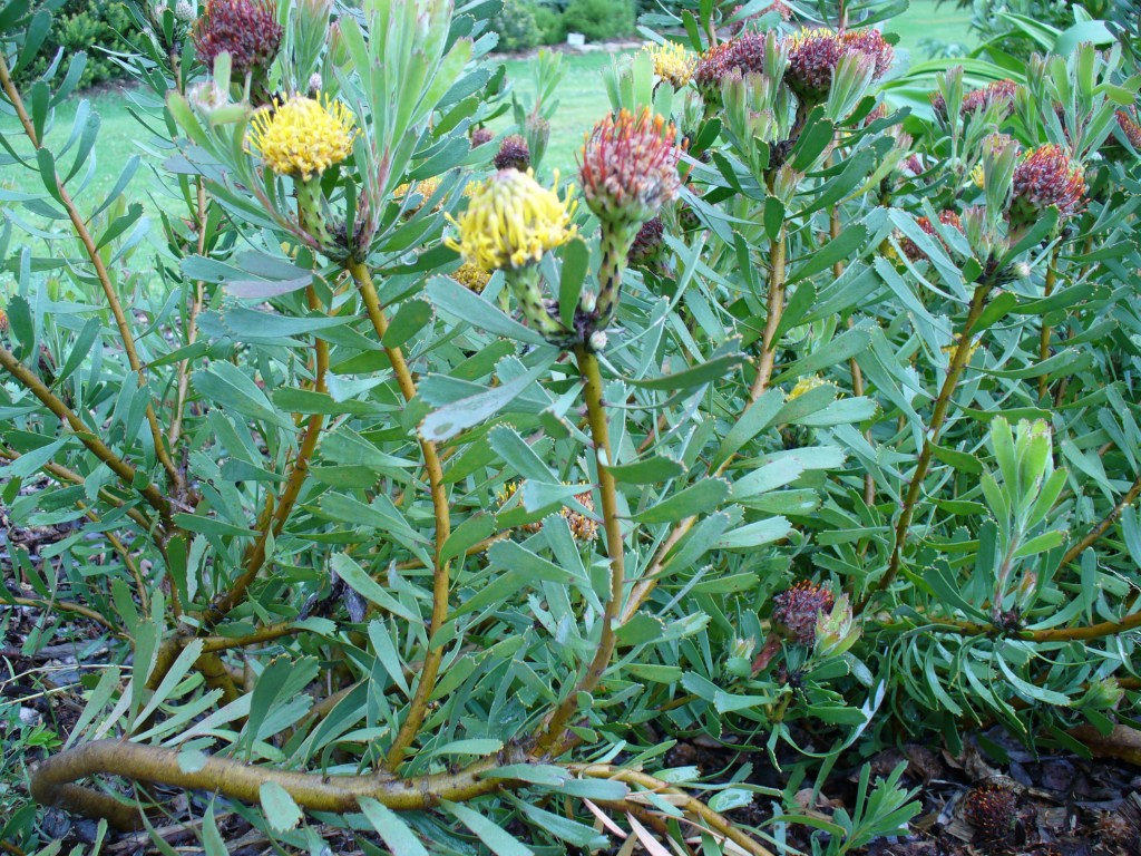 Leucospermum muirii plant